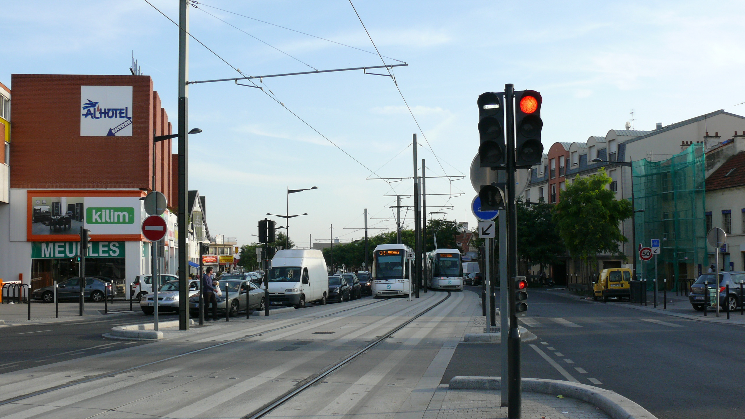 Croisement de rames du T5 à Pierrefitte, entre Mairie de Pierrefitte et Suzanne-Valadon